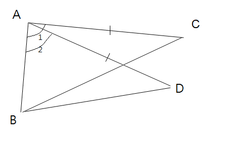 樞紐定理圖例